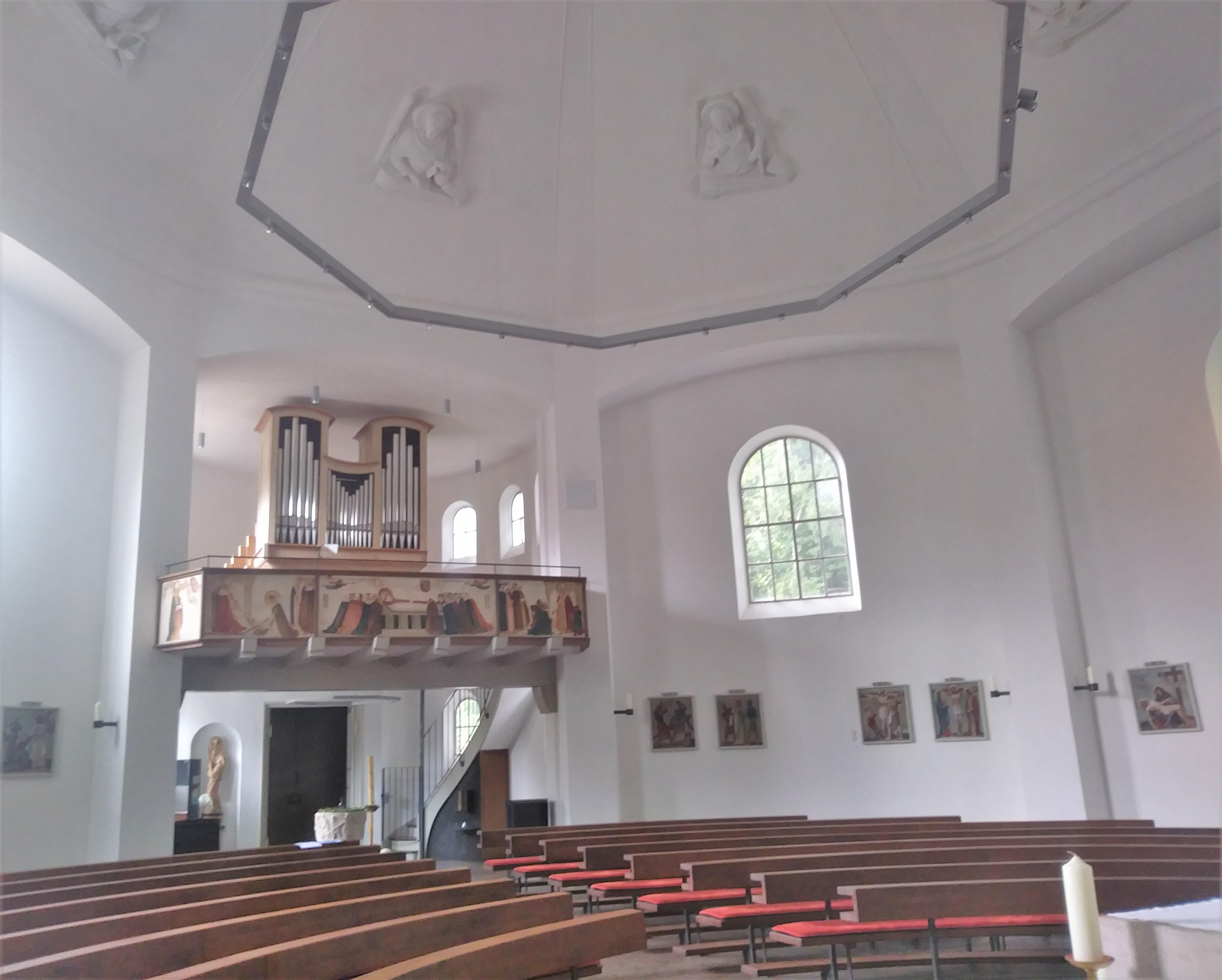 Saint Otto of Bamberg Church (Ottobrunn)